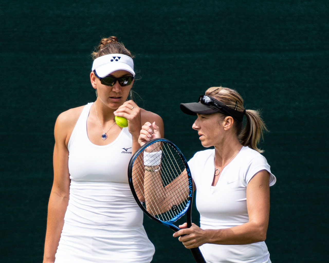 Nicole Melichar & Kveta Peschke